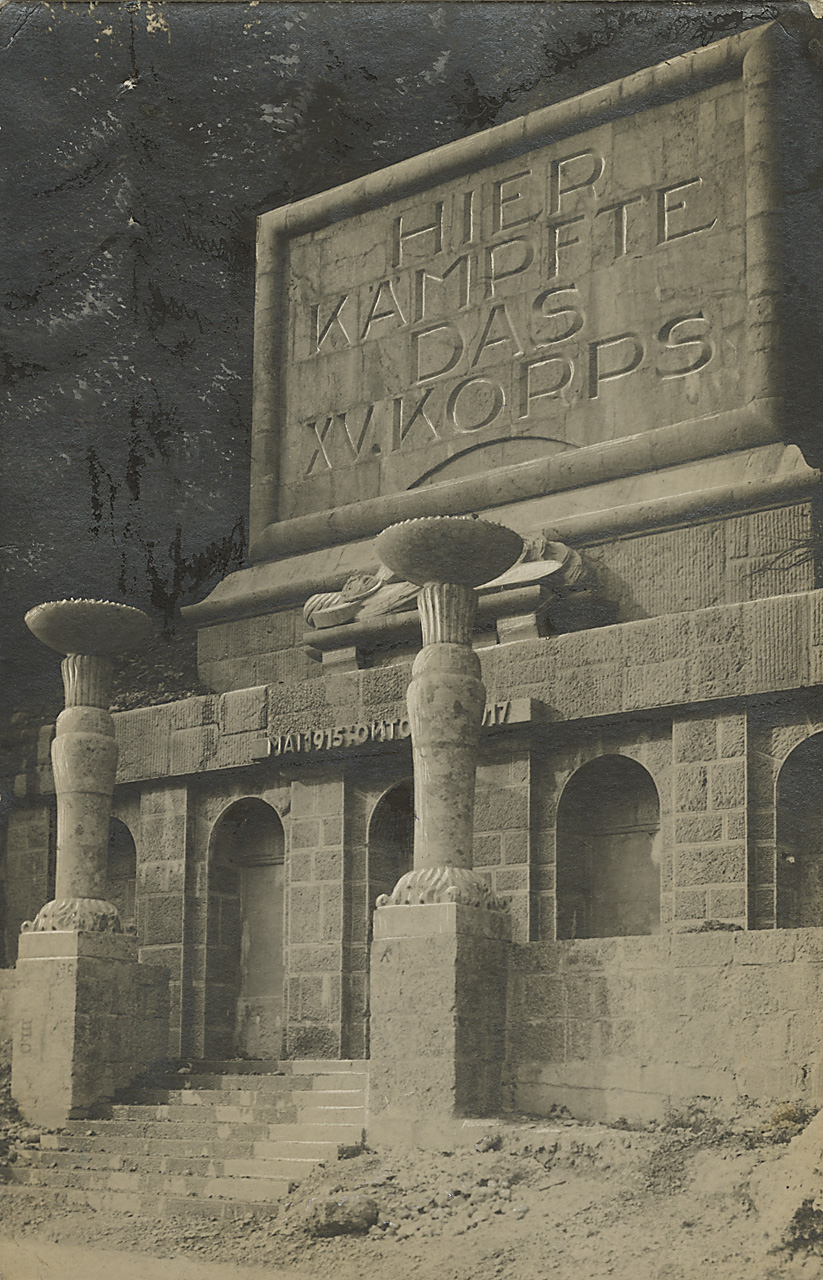 Monumento